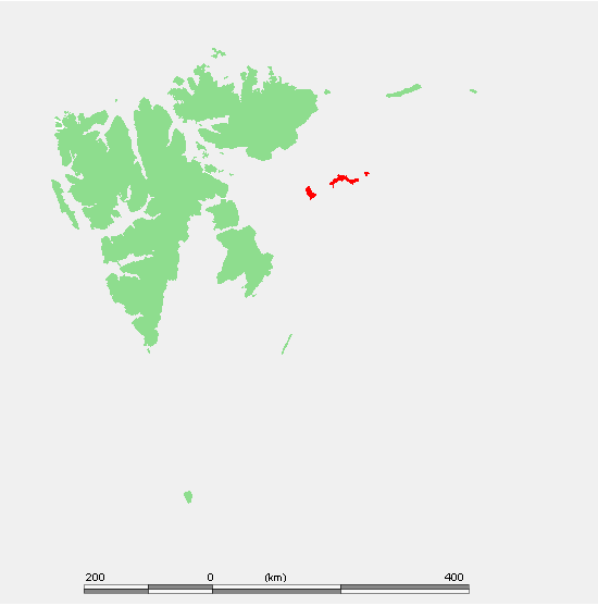 Svalbard Islands - Russia - Spitsbergen - Kong Karls Land - Kongsøya.PNG